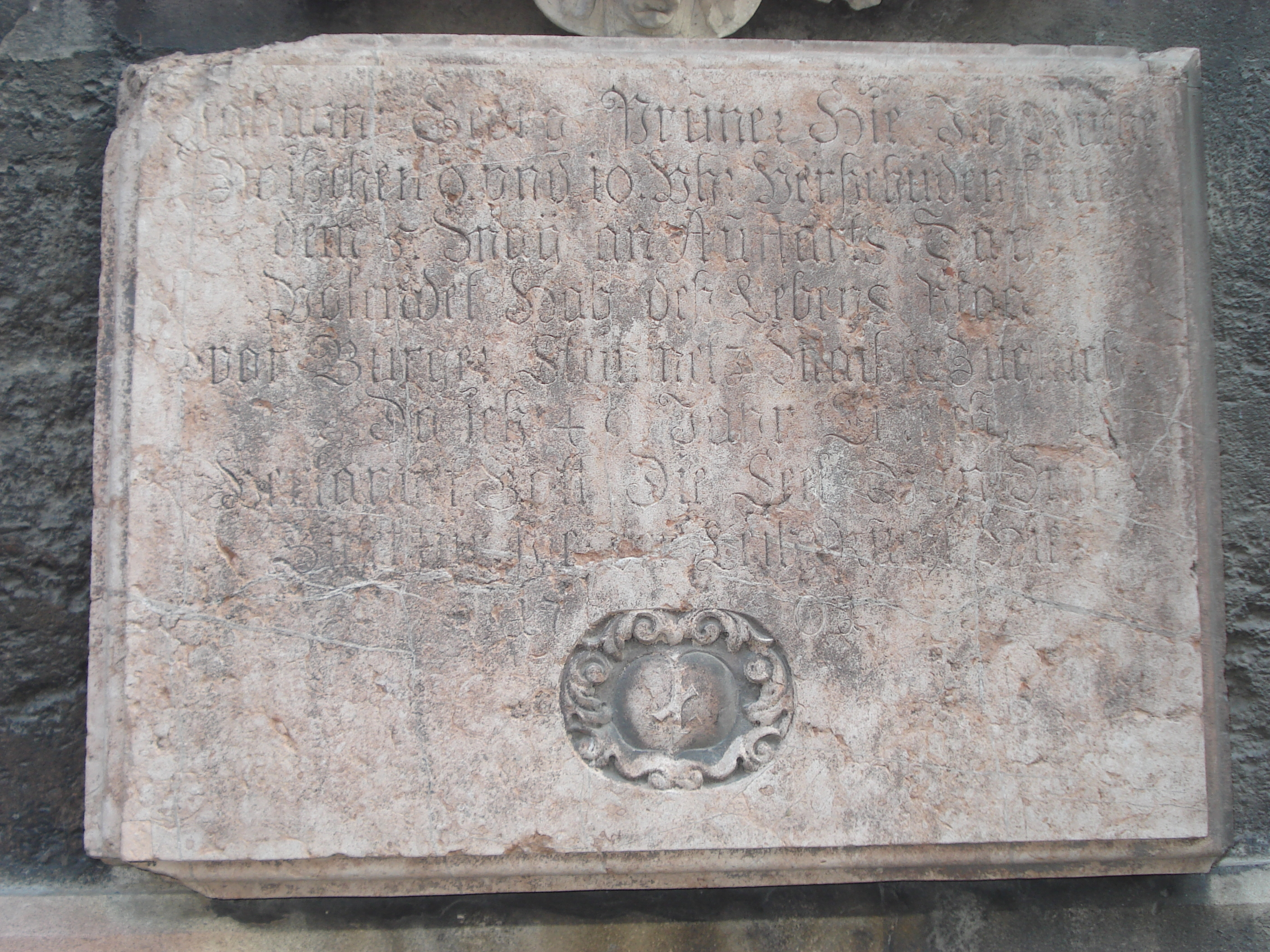 St._Stephan_Epitaph-Prunner